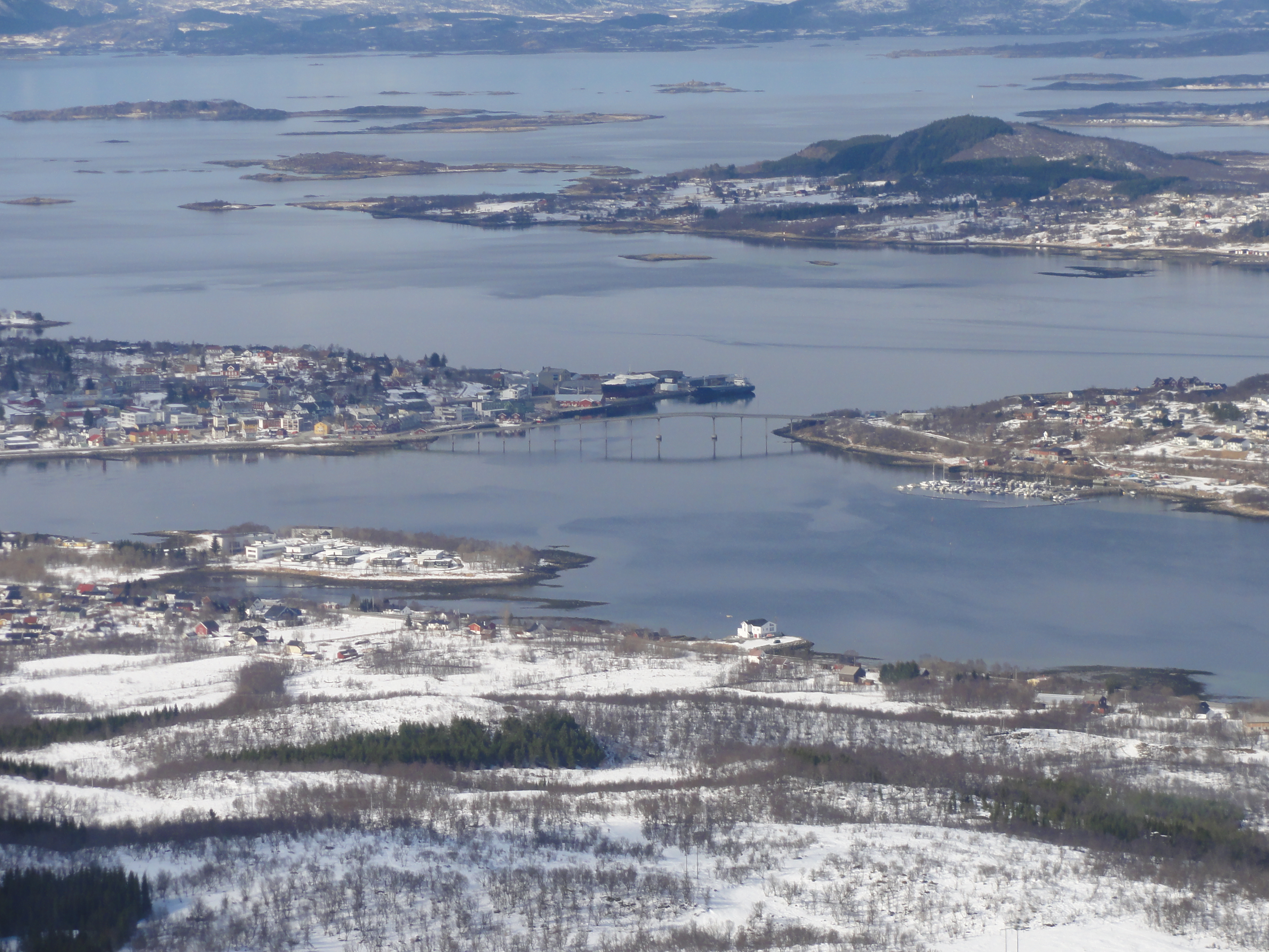 Stokmarknes i Hadsel kommune i Nordland.